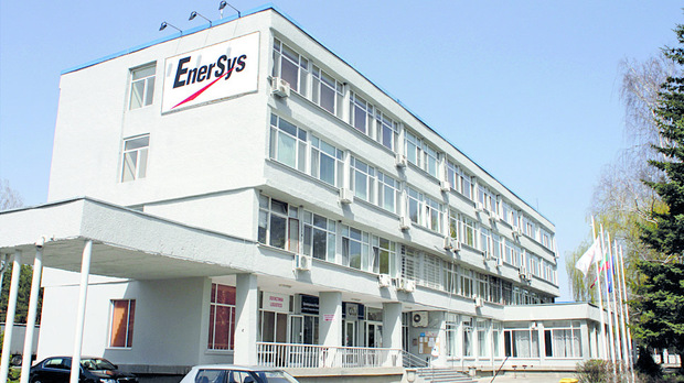 Енерсис